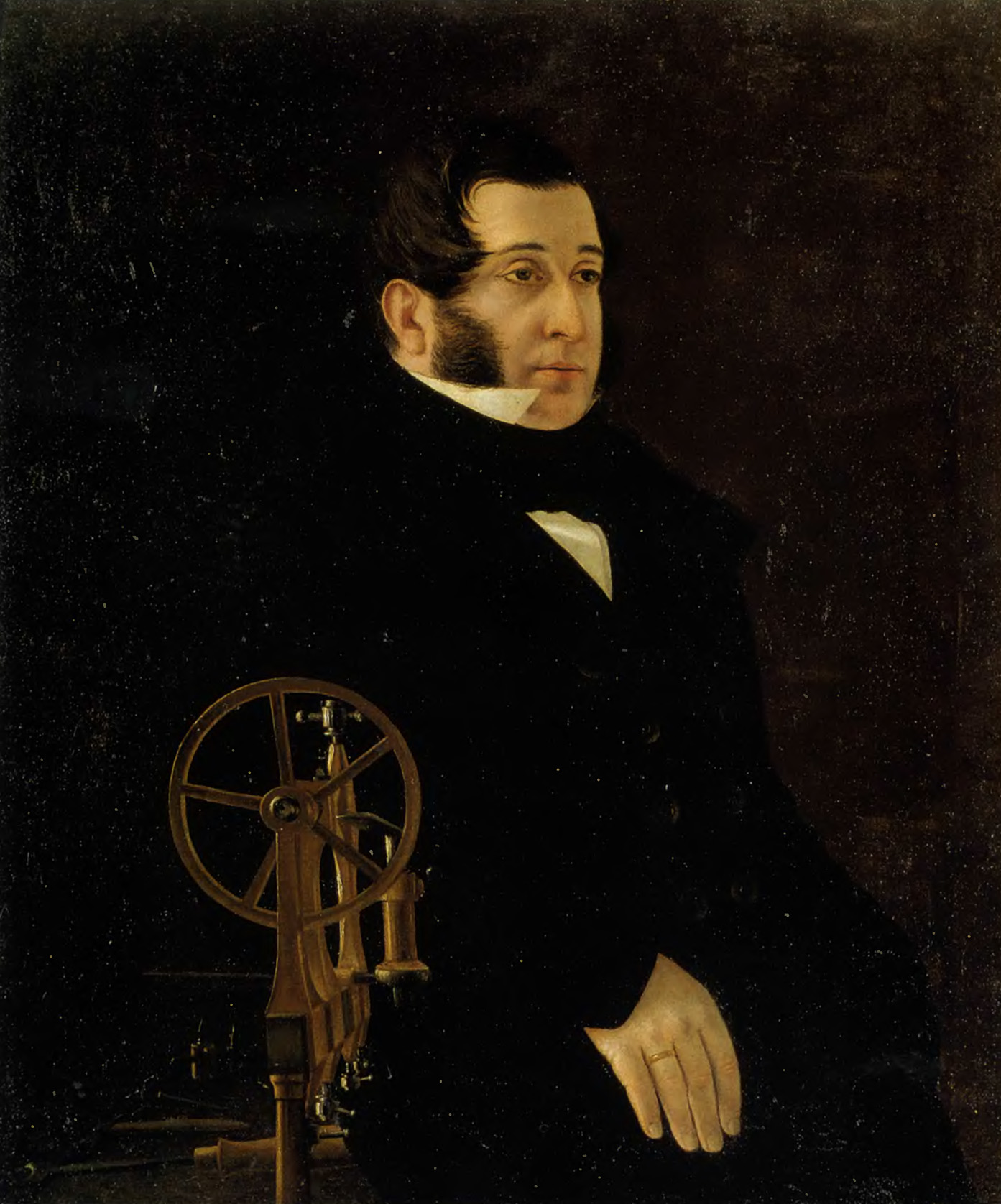 Portrait of Wilibald Swibert Joseph Gottlieb von Besser.label QS:Len,"Portrait of Wilibald Swibert Joseph Gottlieb von Besser." label QS:Luk,"Портрет Вілібальда Бессера."